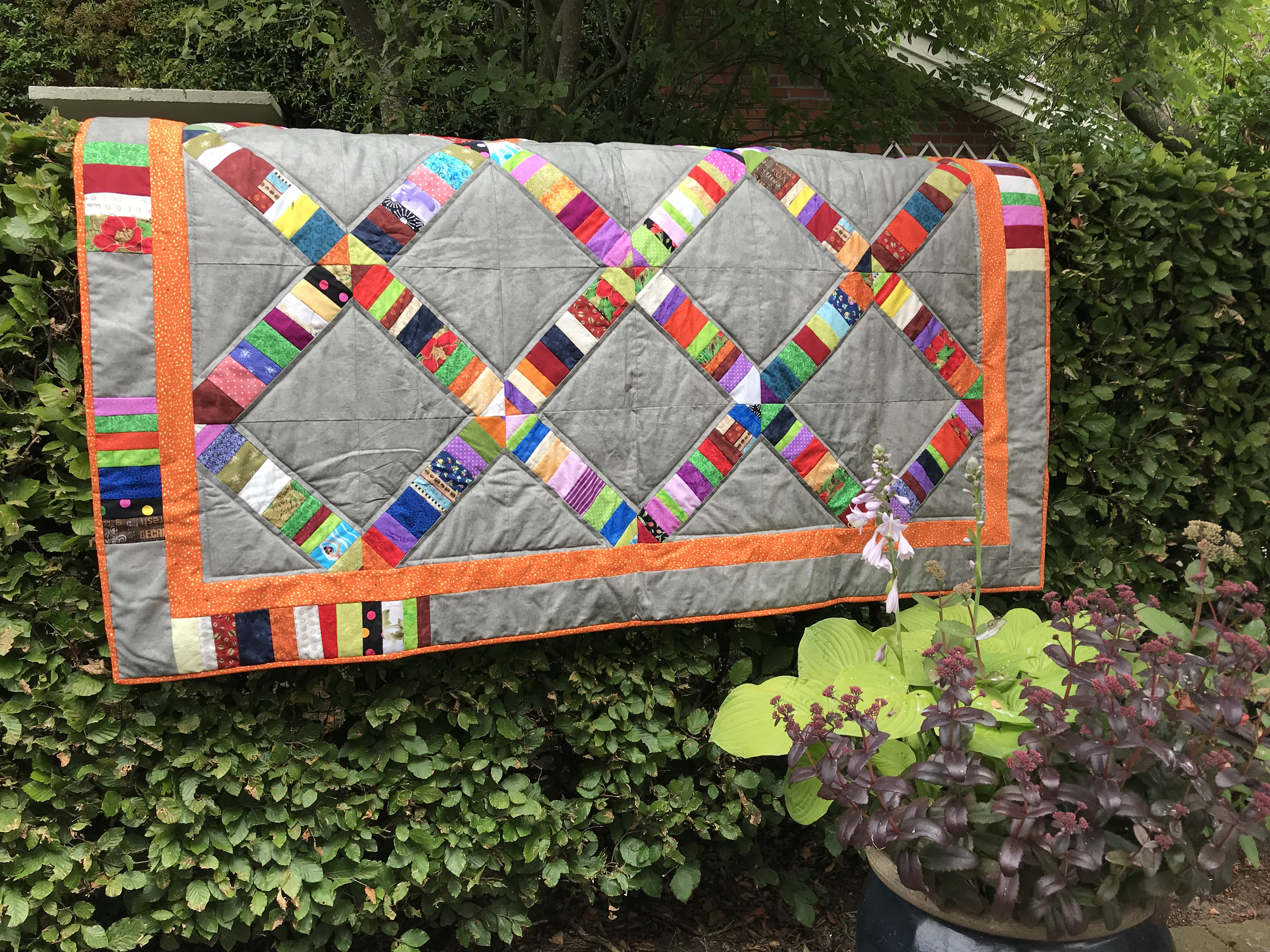 Dette meget smukke tæppe er syet på symaskine med alle forskellige farver. Disse restetæppe giver et helt særlig udtryk.